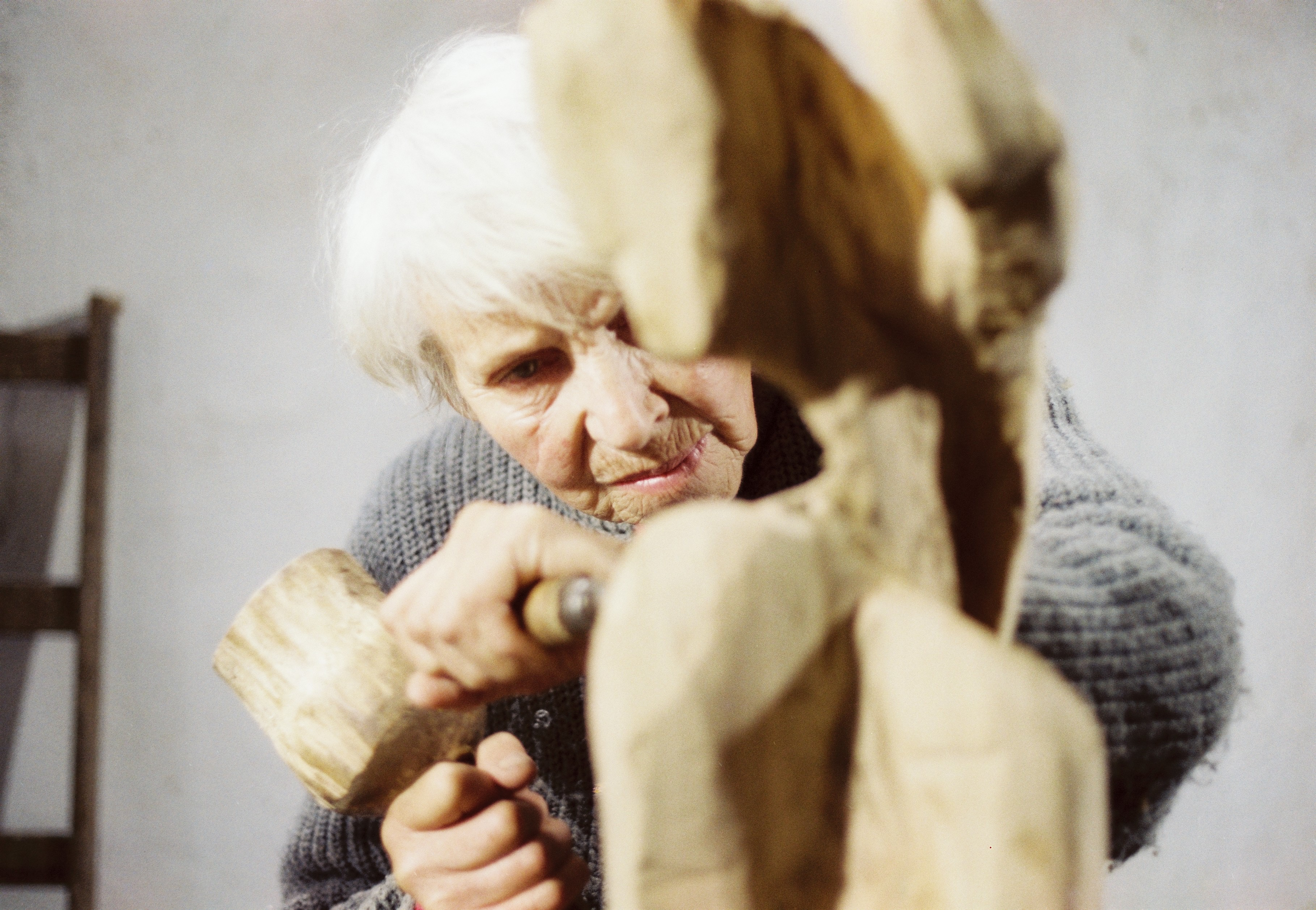 Louise Stomps bearbeitet eine Figur aus Holz in ihrer Werkstatt in der Kumpfmühle bei Rechtmehring